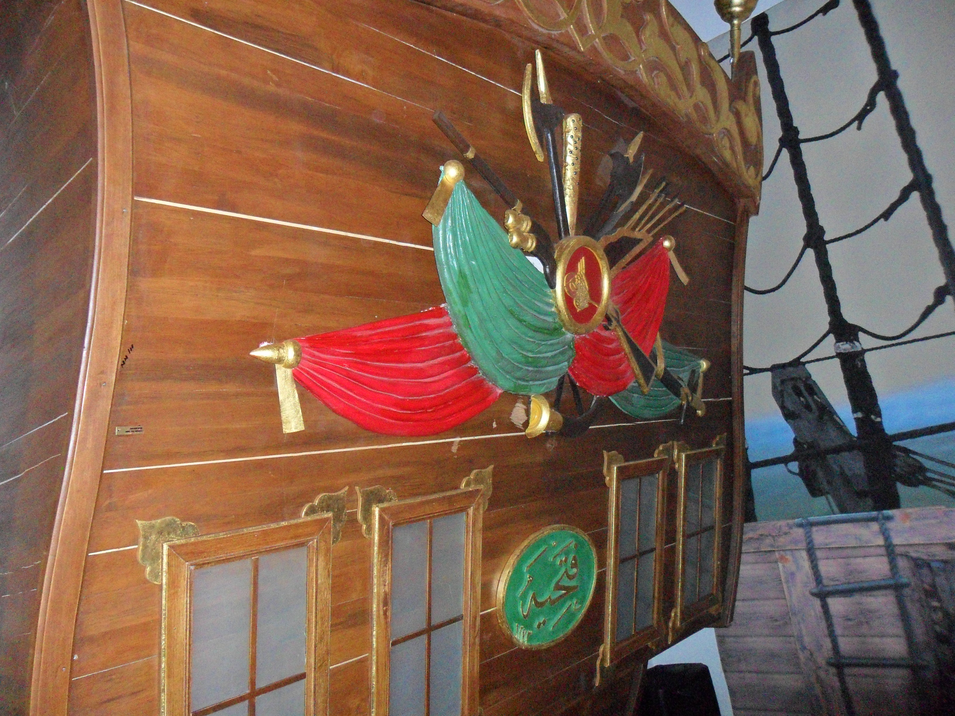 Mersin Deniz Müzesinde sergilenmekte olan Fethiye kalyonunun arması. Tersane-i Amire'de ahşaptan üretilen buharlı bir uskurlu kalyon olan Fethiye 1856-1903 yılları arasında hizmet vermiştir. Oyma kabartma armada sancak, borazan, balta, mızrak, tüfek, sadak, korno ve kılıç yer almaktadır. Armanın merkezinde Abdülmecid'in tuğrası yer almaktadır. Bu arma yine Tersane-i Amire'de 1861 yılında imal edilmiştir.